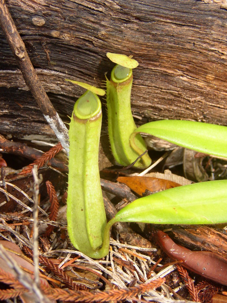 Photo taken in natural habitat.